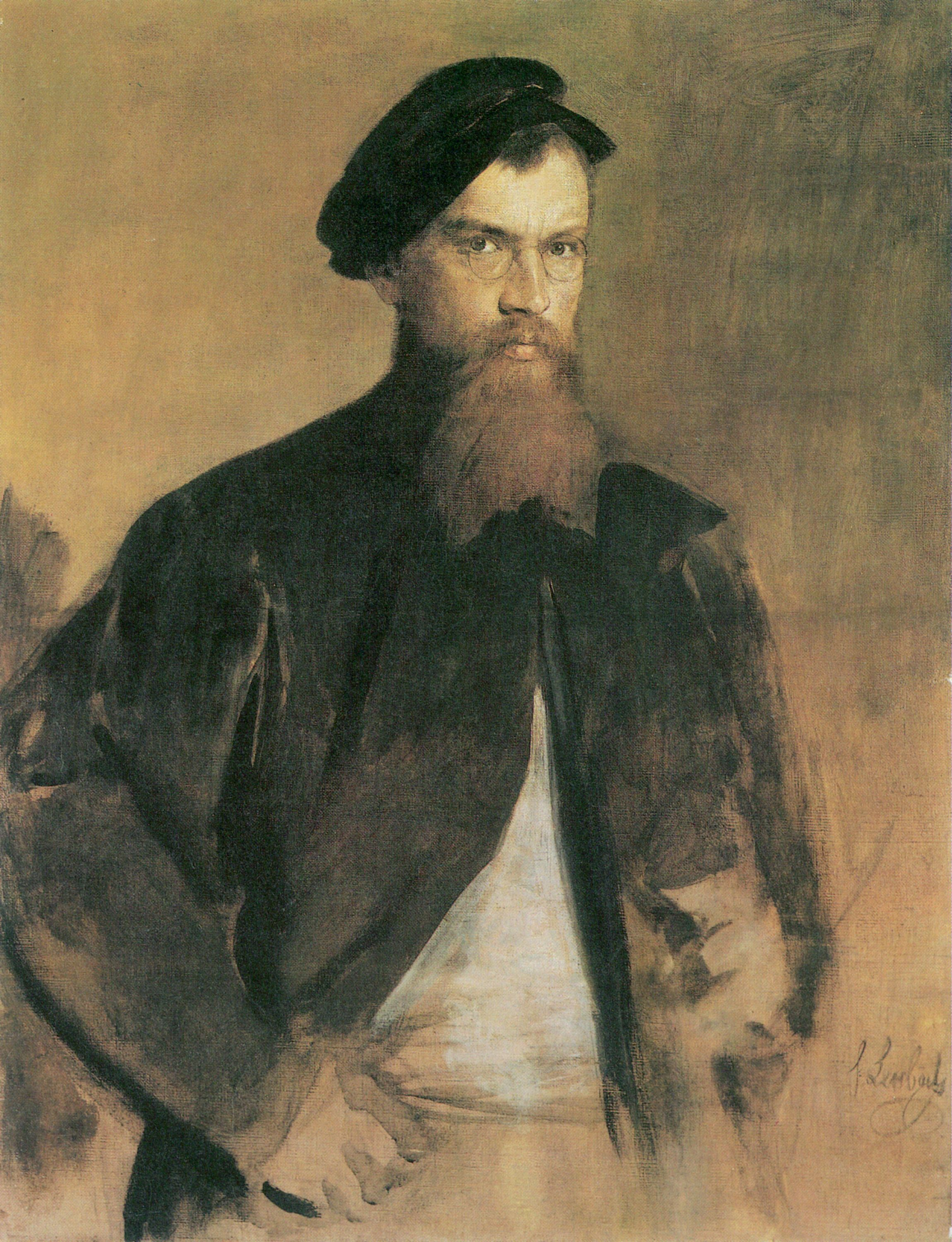 Self-portrait